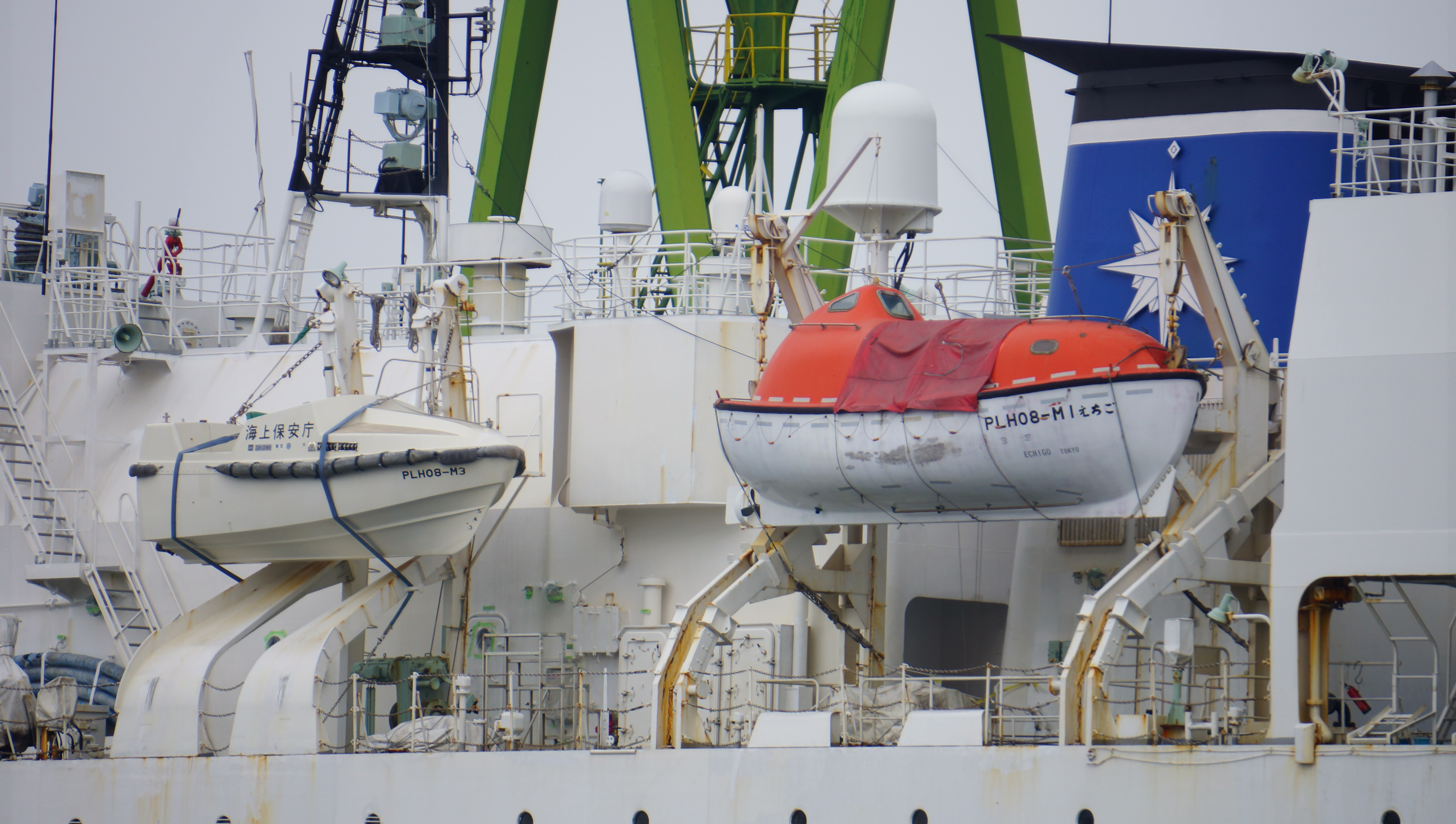 海上自衛隊 巡視船えちご（PLH-08） 右舷側搭載艇。2013年11月4日 川崎重工神戸工場にて。